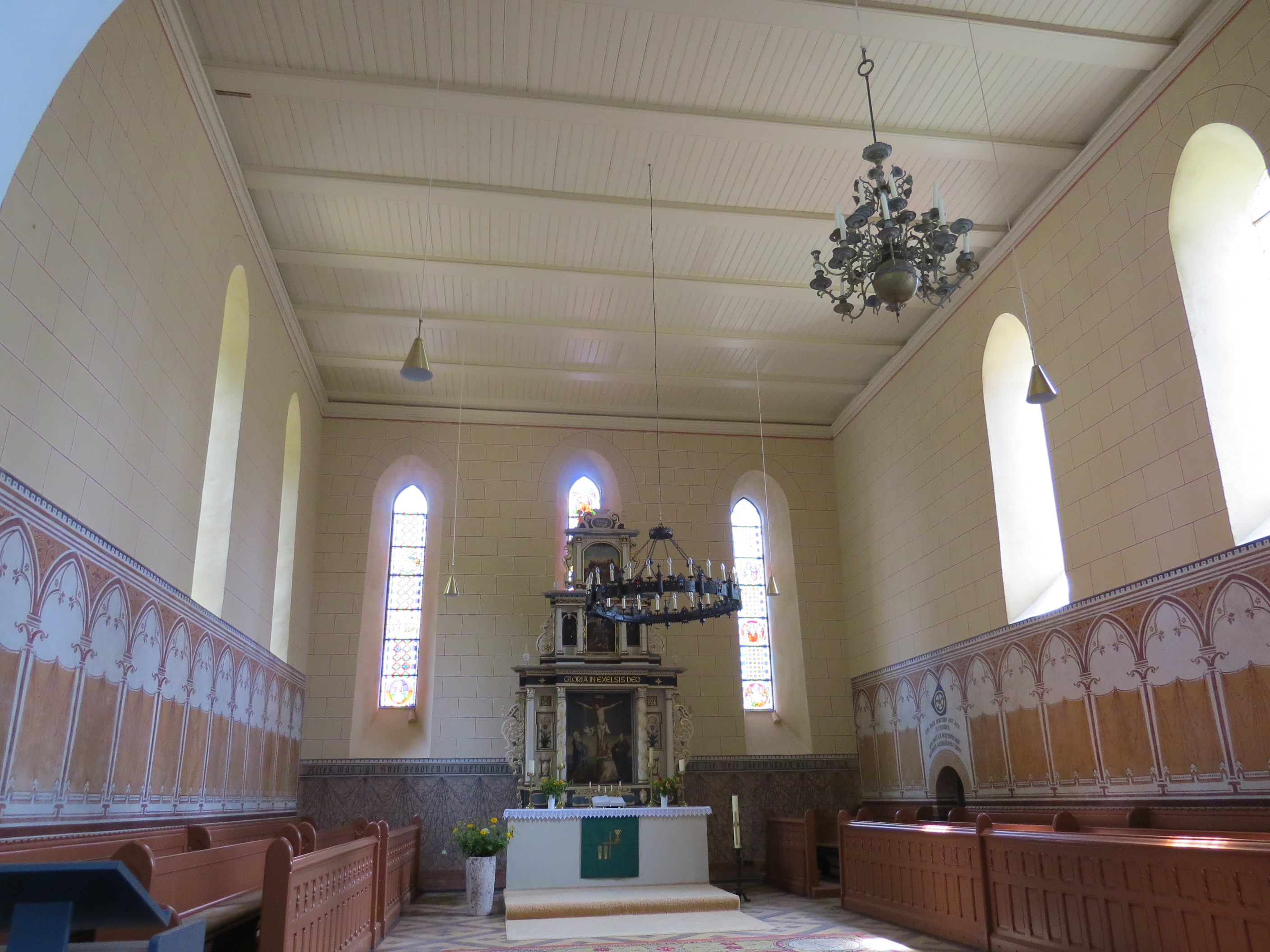 Inneres der ev. Kirche St. Johannes zu Lychen: Chorraum mit Altar, Gestühl, Kronleuchter und Wandmalerei